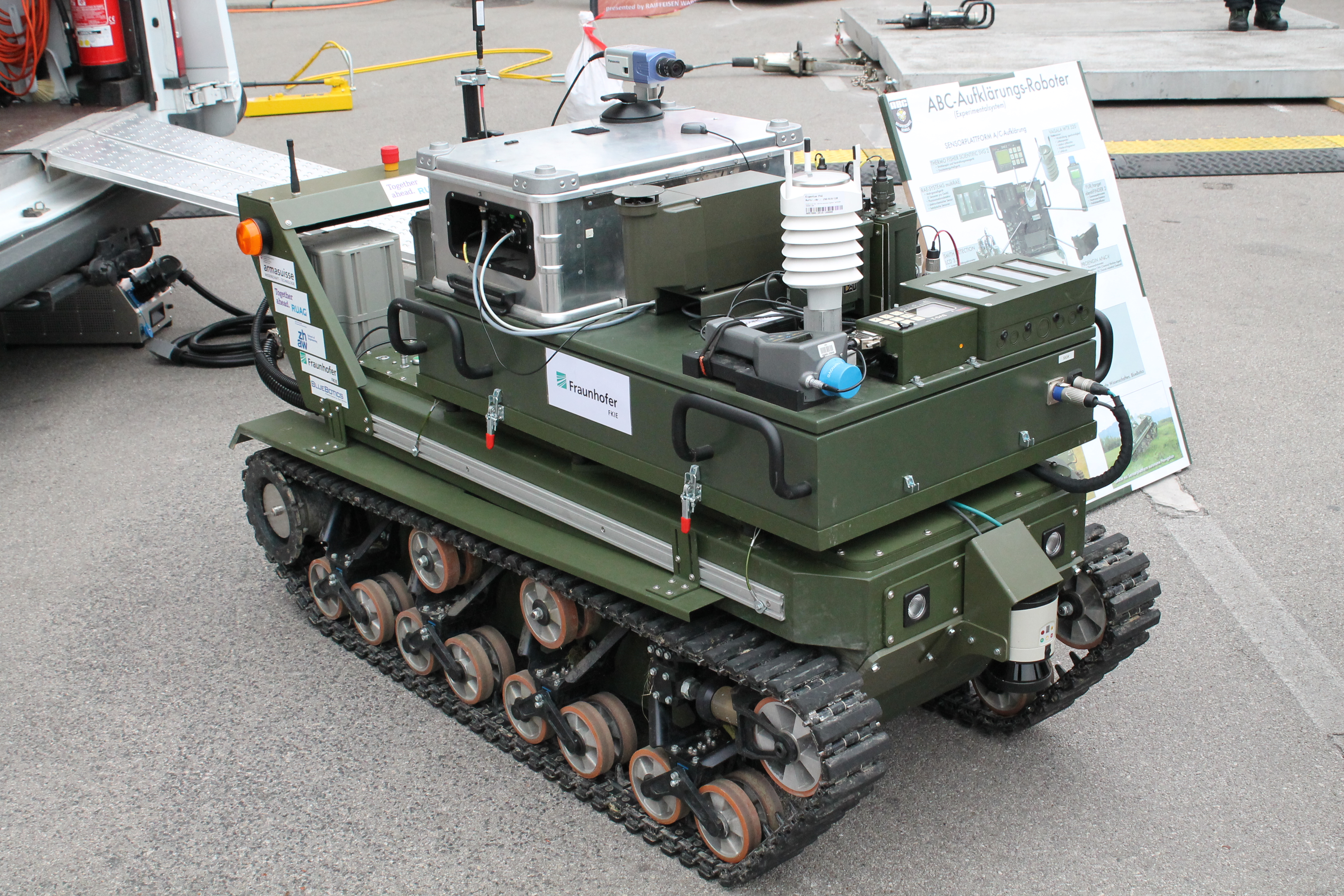 Experimenteller ABC-Aufklärungs-Roboter der deutschen Bundeswehr